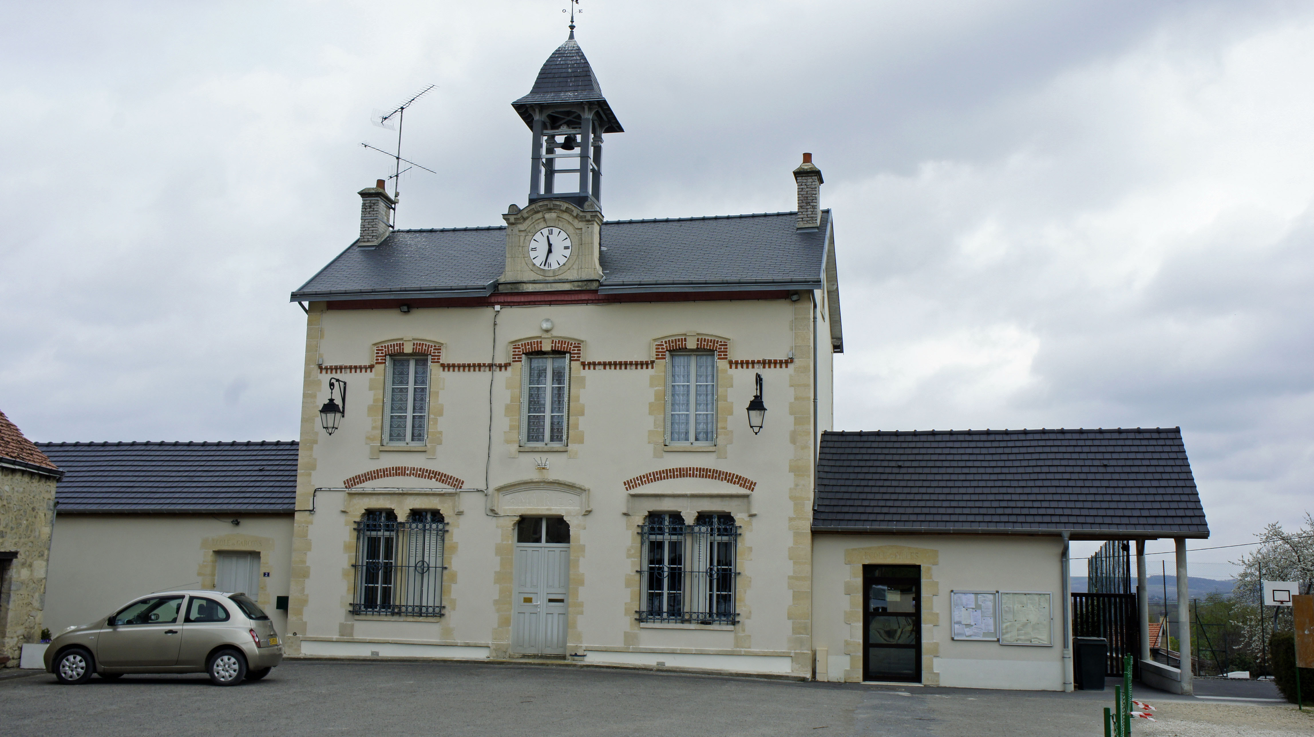 Mairie à Branscourt.